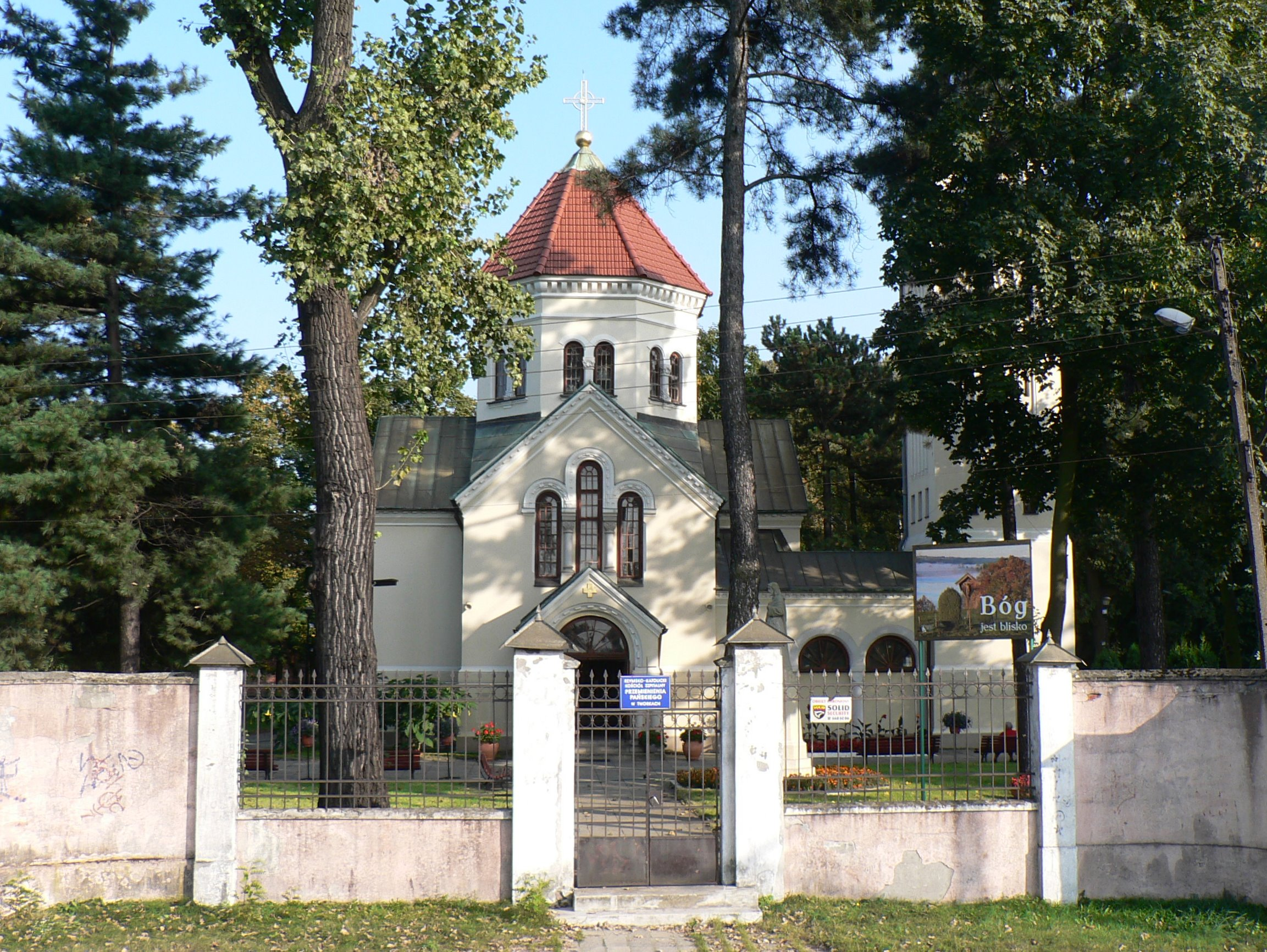 Pruszków Tworki - dawna cerkiew, obecnie kościół rzymskokatolicki pw. Przemienienia Pańskiego w zespole urbanistyczno-architektonicznym szpitala psychiatrycznego